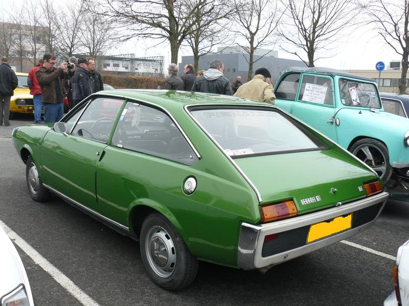 Reims 2012